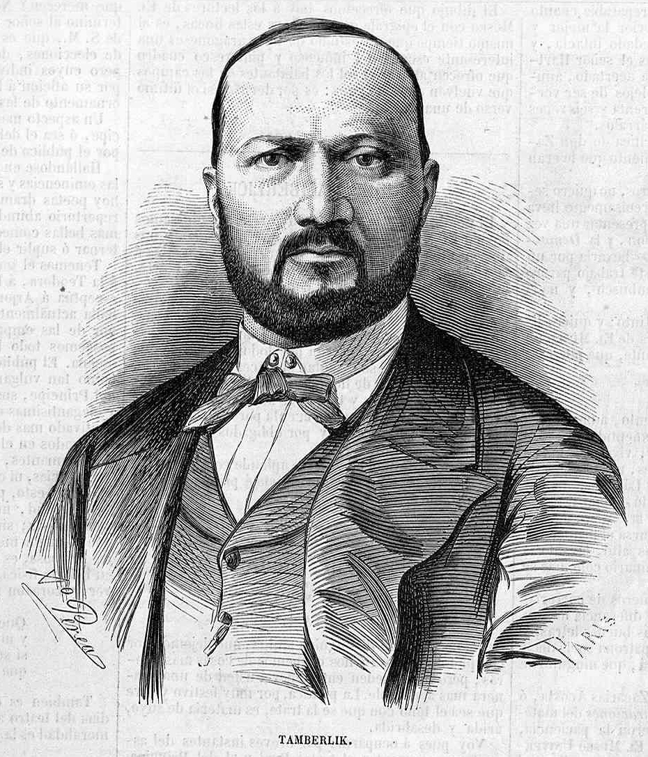 Enrico Tamberlick, en la revista española El Museo Universal.